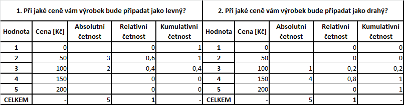 Test cenové citlovosti tabulka